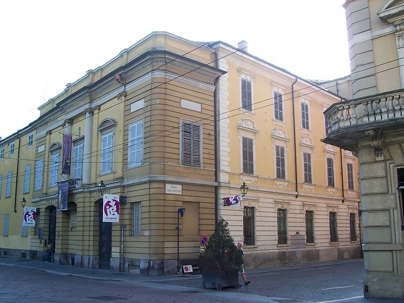 Parma - Museo Glauco Lombardi